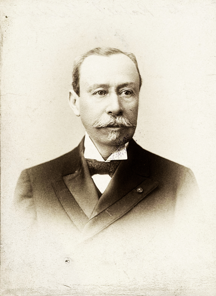 Retrato del presidente salvadoreño Dr. Rafael Zaldívar, en 150 años de fotografía en la Biblioteca Nacional, p. 249 ( Biblioteca Nacional de España).